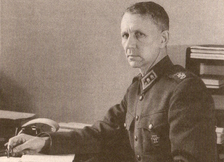 General Harald Öhqust, 1930s